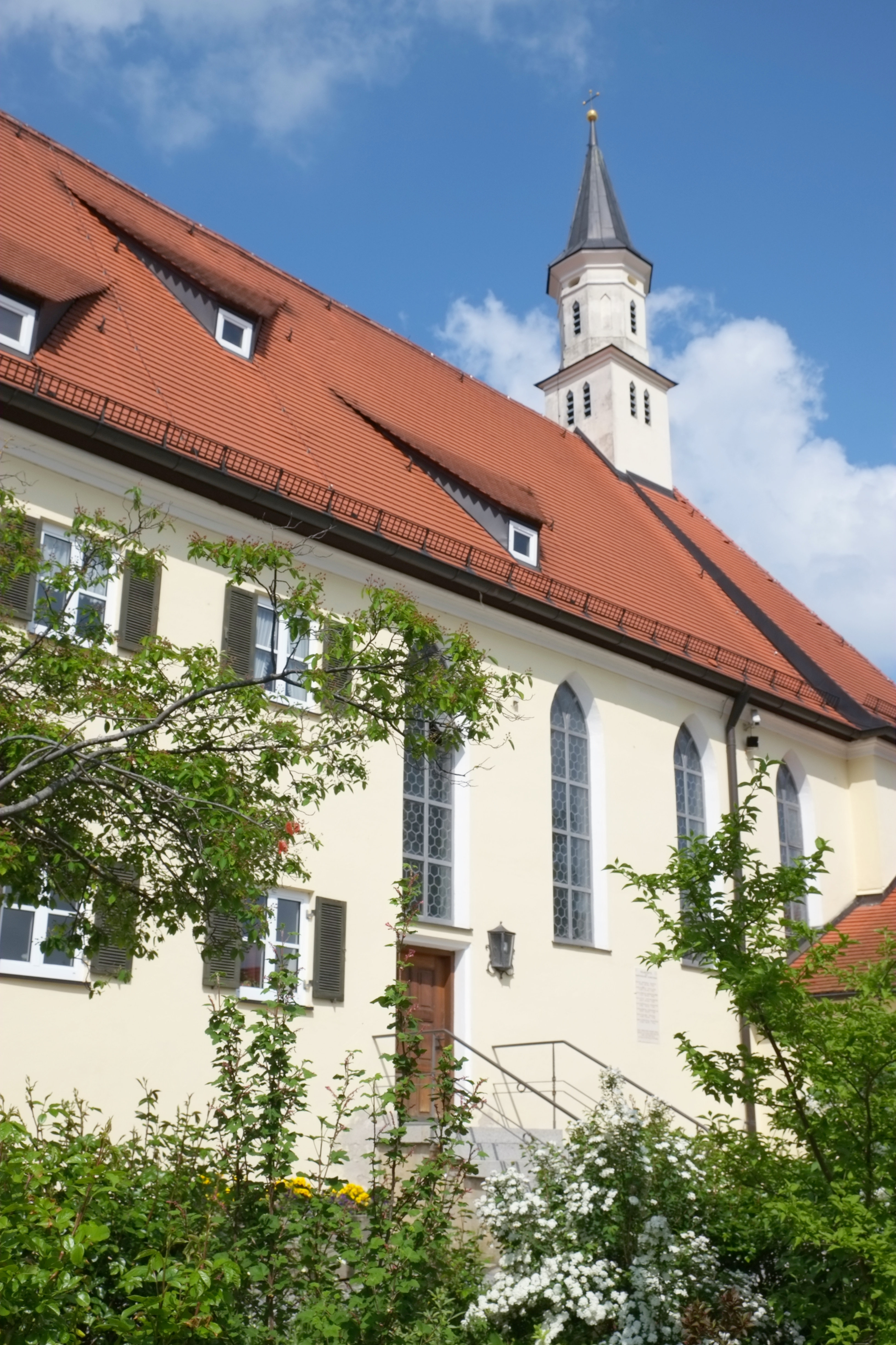 Spitalkapelle Mariä Himmelfahrt in Dinkelscherben im Landkreis Augsburg (Bayern, Deutschland)